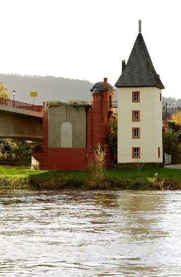 Alte und neue Brücke von Trittenheim (selbst fotografiert)